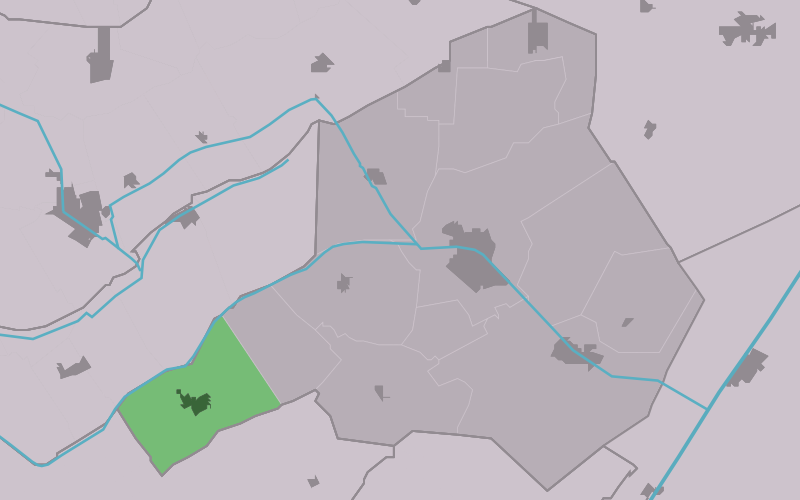 Kaartsje fan himrik fan Aldeberkeap